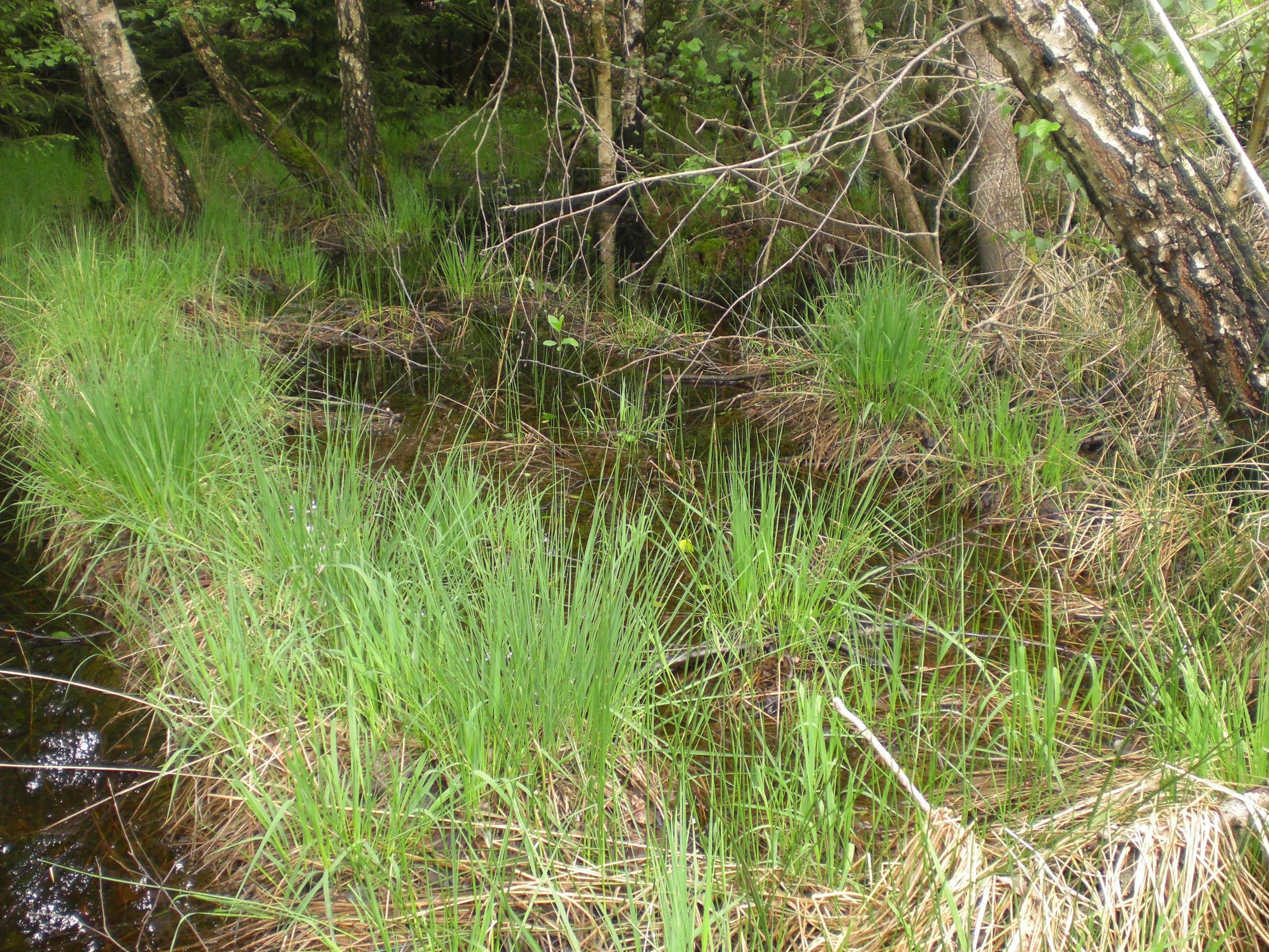 Moorwiese im NSG Jägersburger Moor